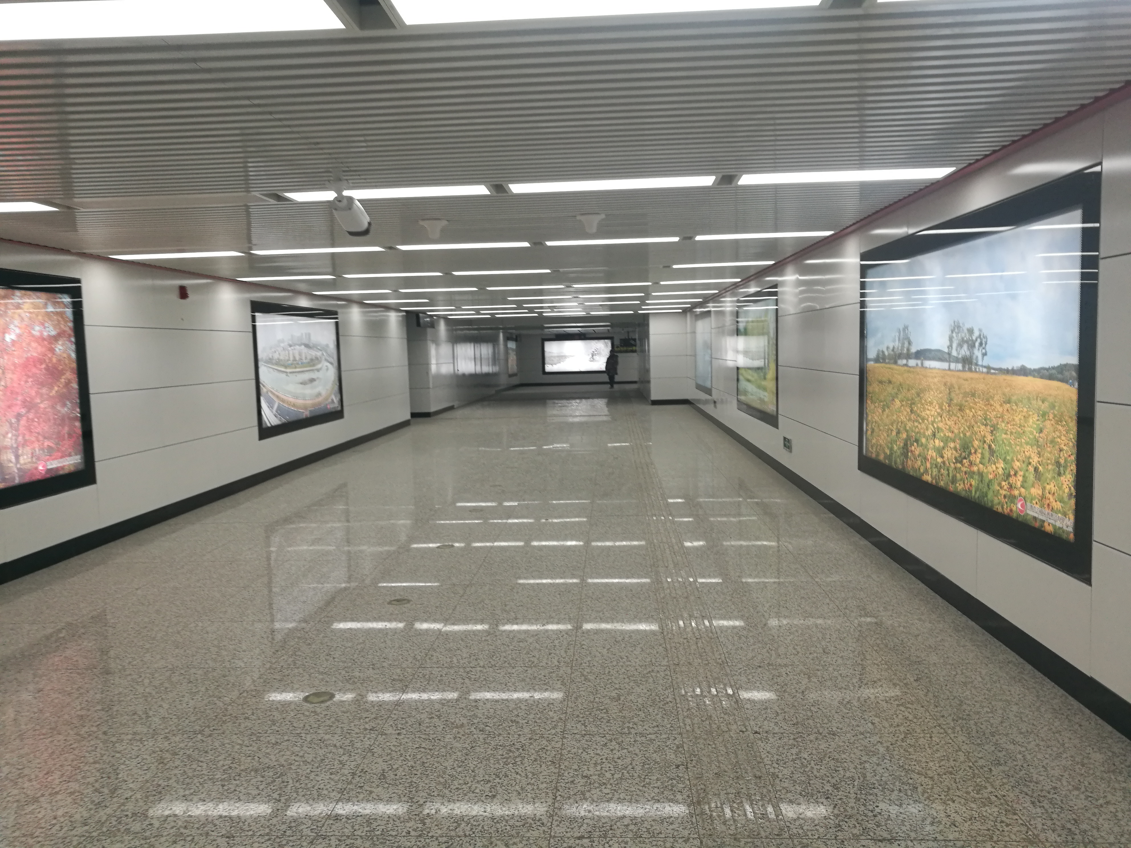 南环城路站文化墙